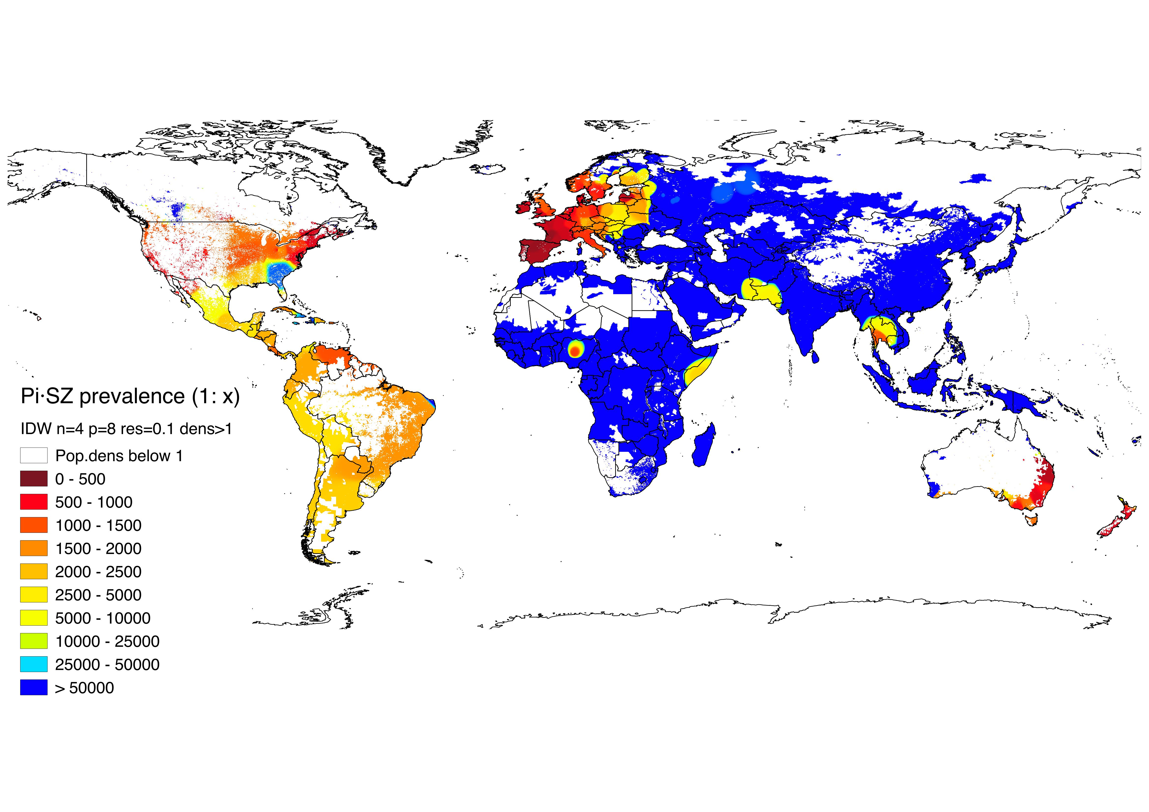 Prevalence of Pi*SZ genotypes worldwide